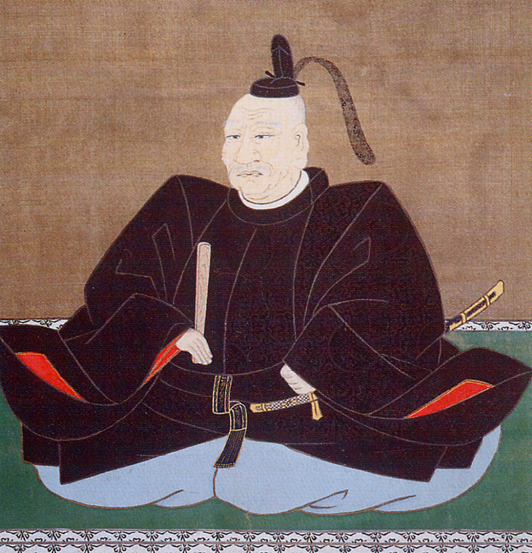 藤堂高虎 Toudou Takatora.Tōdō Takatora.